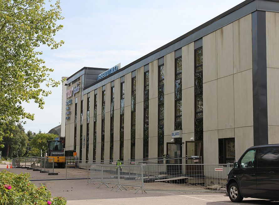 Vantaan Tikkurilan urheilutalo eli samassa rakennuksessa sijaitsevat Trio Sport Center ja hotelli Tikkurila. Rakennuksen ympristöä kunnostettin elokuussa 2013. Huom: Muista säilyttää viittaus kuvaajaan, mikäli käytät kuvaa.